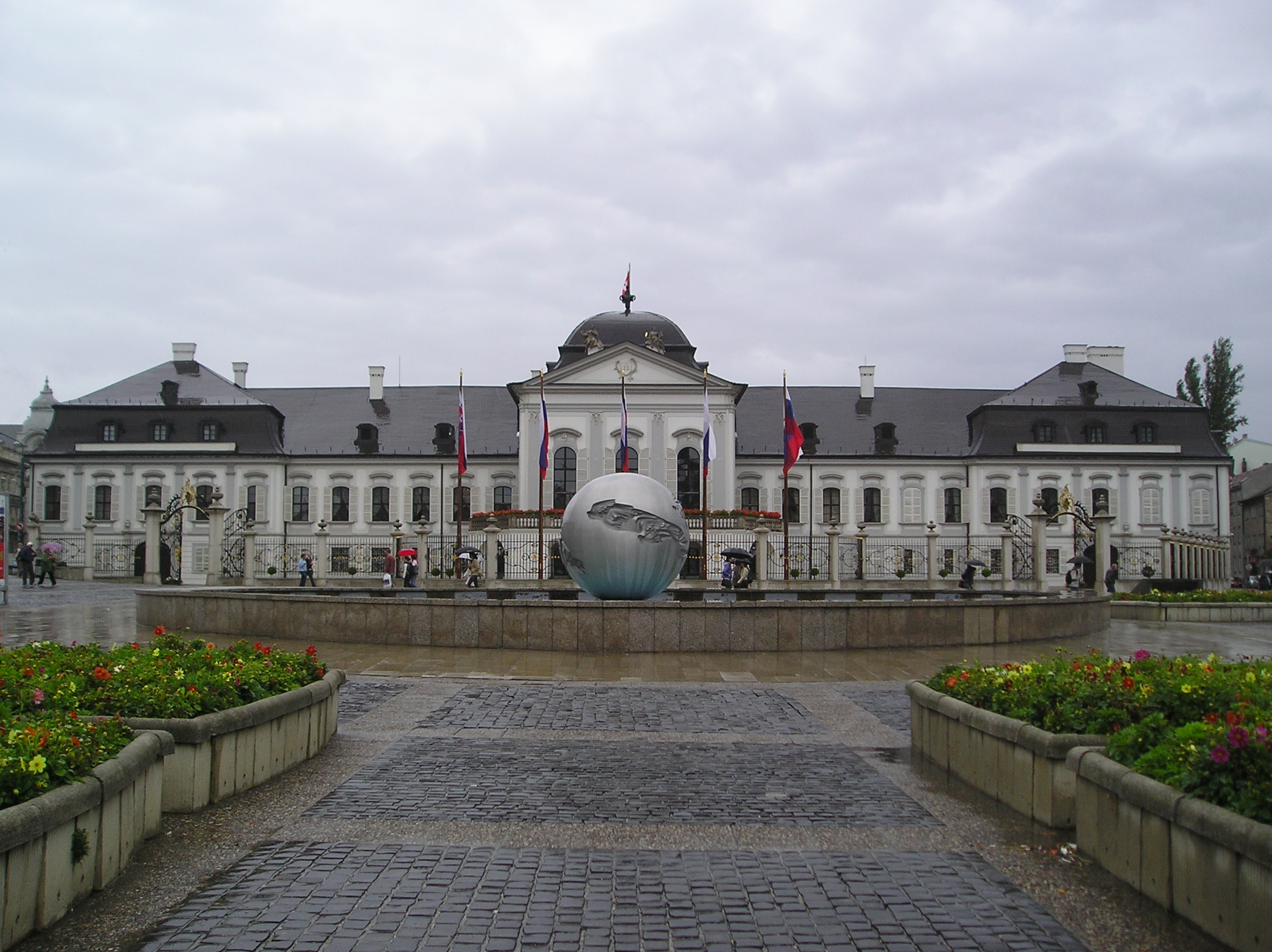 Questa foto rappresenta il Palazzo Presidenziale di Bratislava (sede dei Presidenti della Slovacchia), è stata scattata da me, G. Salluzzi nell'agosto 2005 ed è rilasciata in Pubblico Dominio